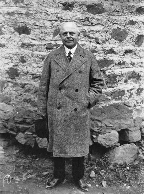 Forrer, Strasbourg : musée de Glozel : (photographie de presse : Agence Meurisse)